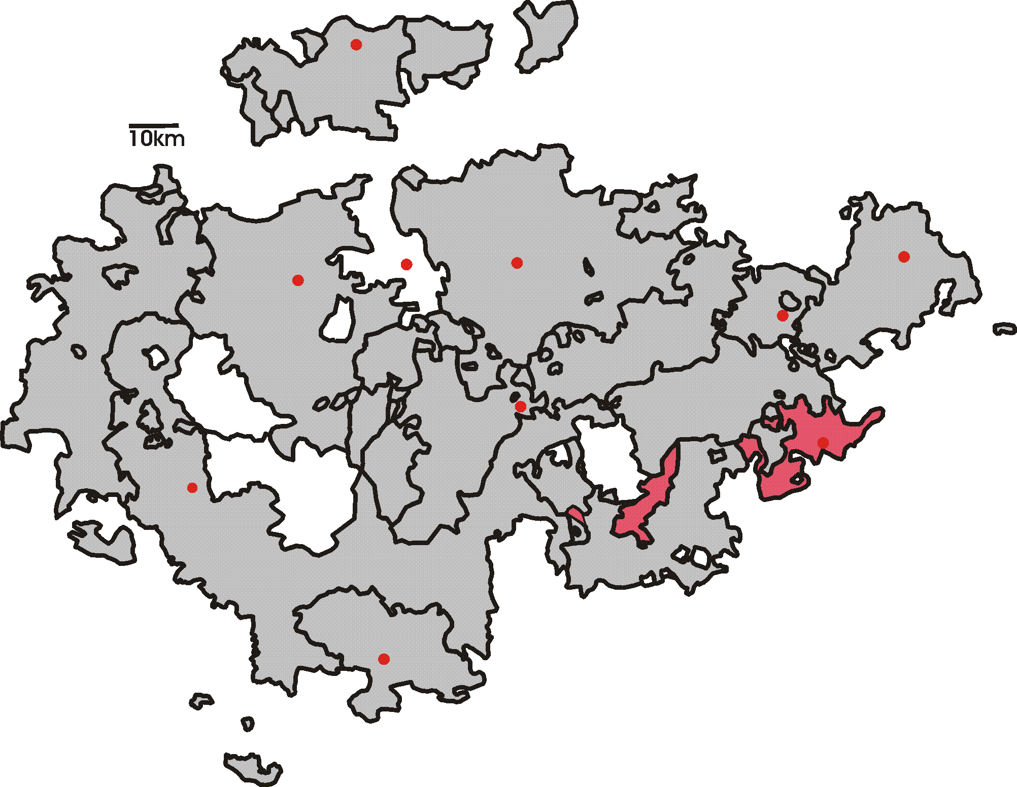 Karte von Thüringen um 1900. Hervorgehoben das Fürstentum Reuß älterer Linie